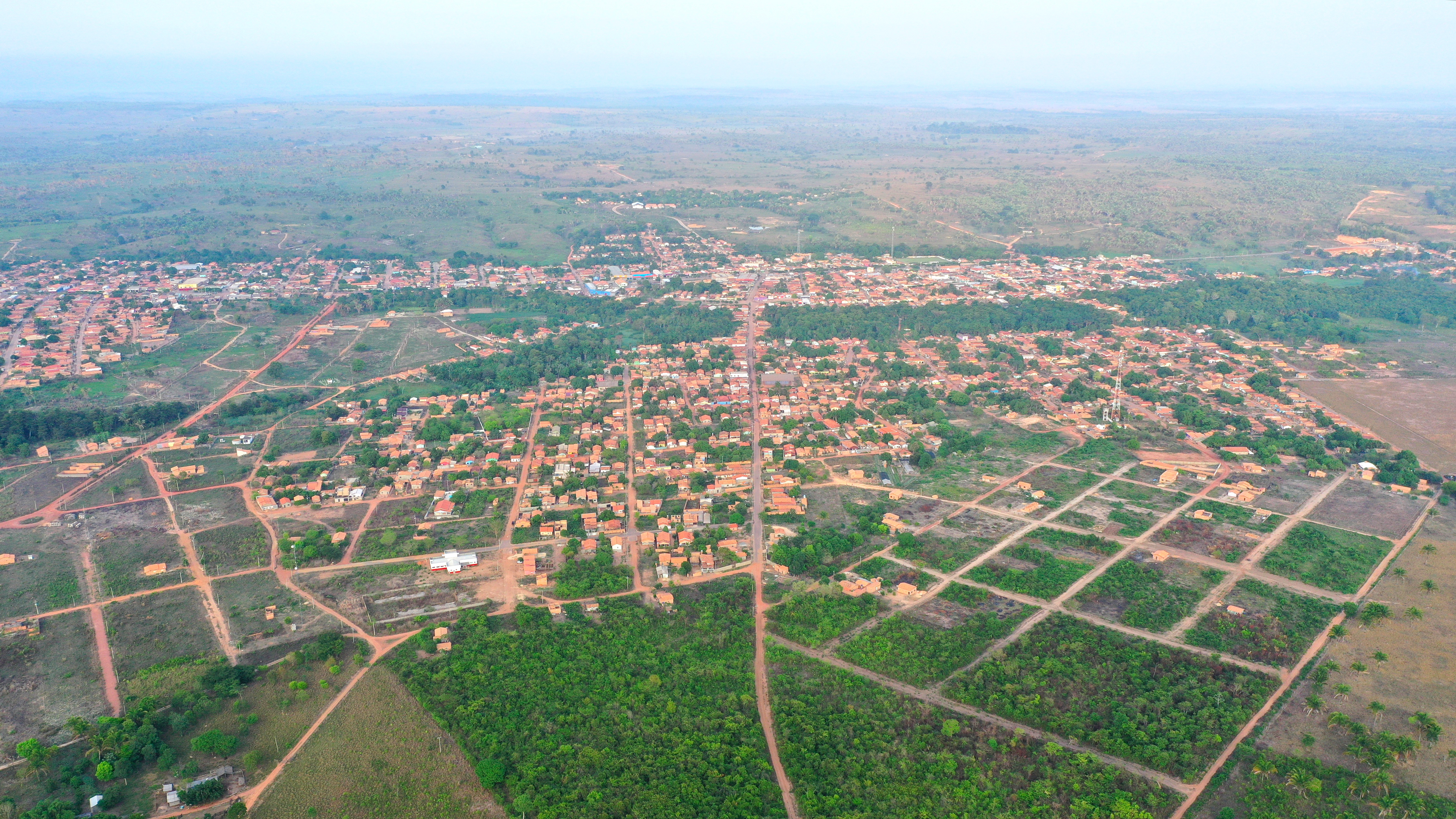 Vista aérea do município de São Domingos do Araguaia-PA em 2019